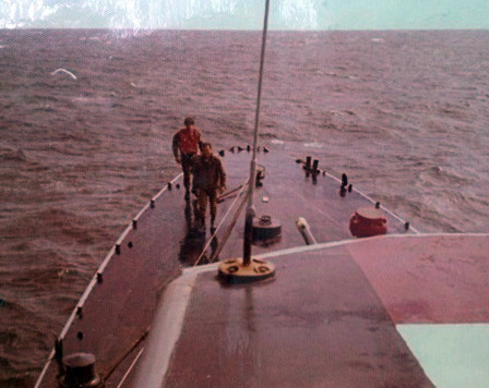 אח"י כידון מתקדמת באוקינוס האטלנטי